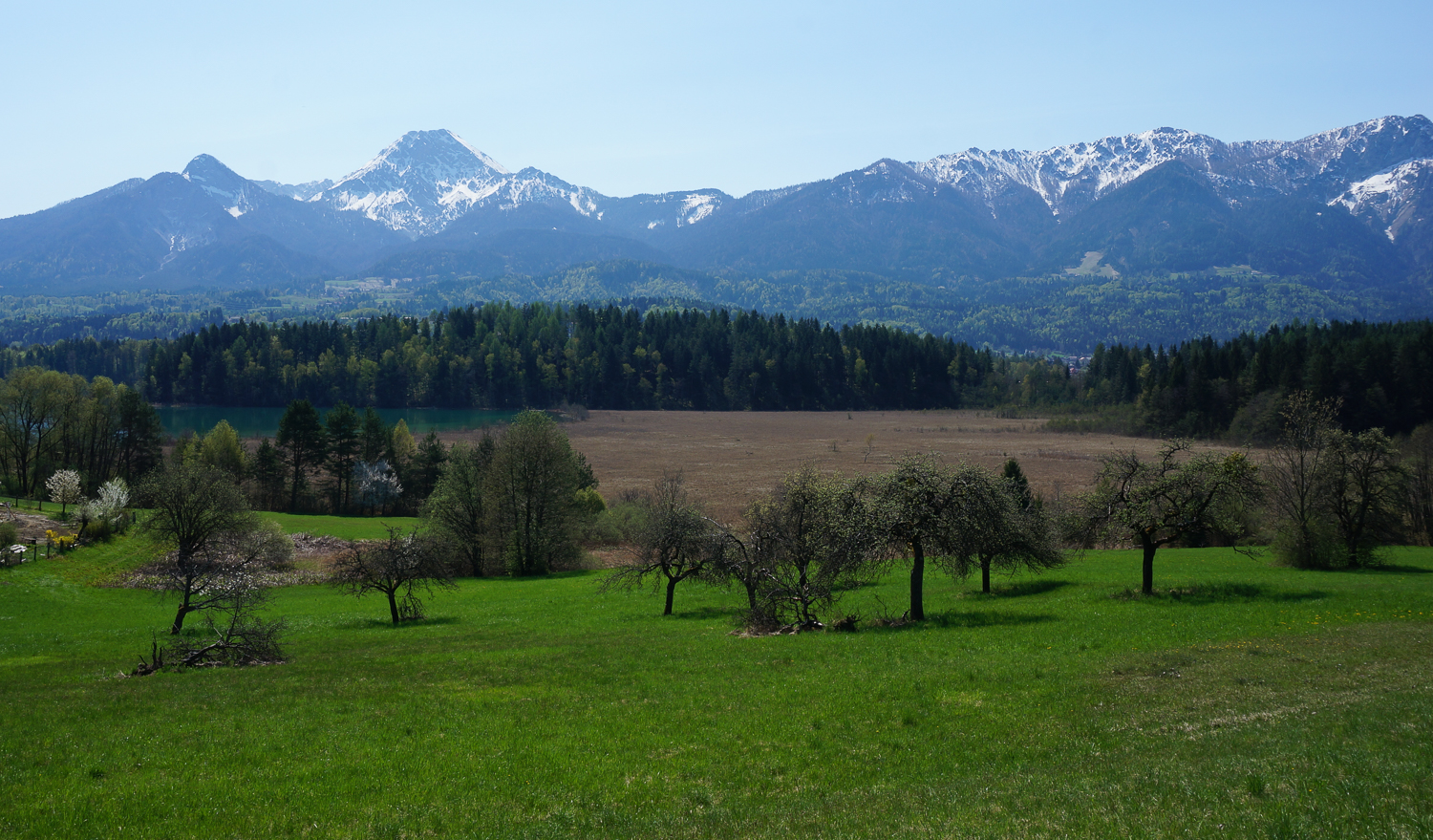 Finkensteiner Moor This media shows the nature reserve in Carinthia with the ID NSG.030.